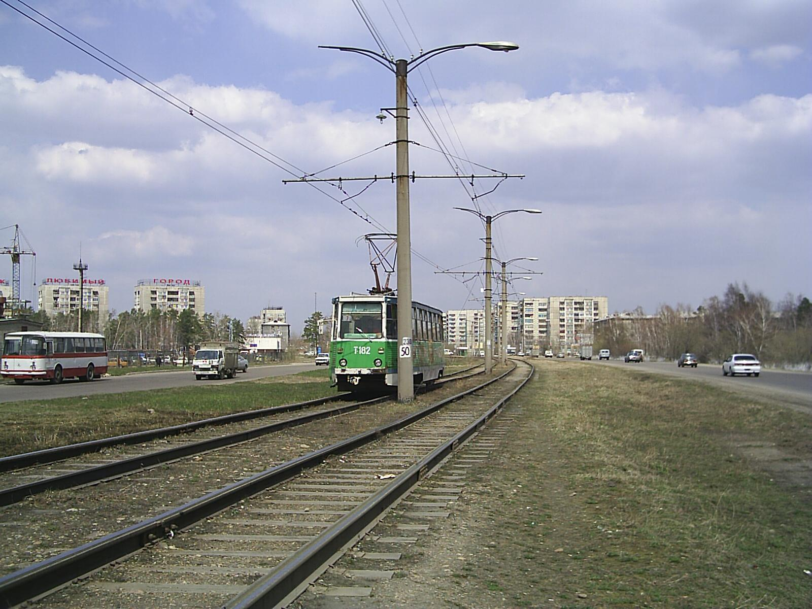 г. Ангарск, Иркутская область, Россия. Ленинградский проспект. Снимки мая 2005 г.